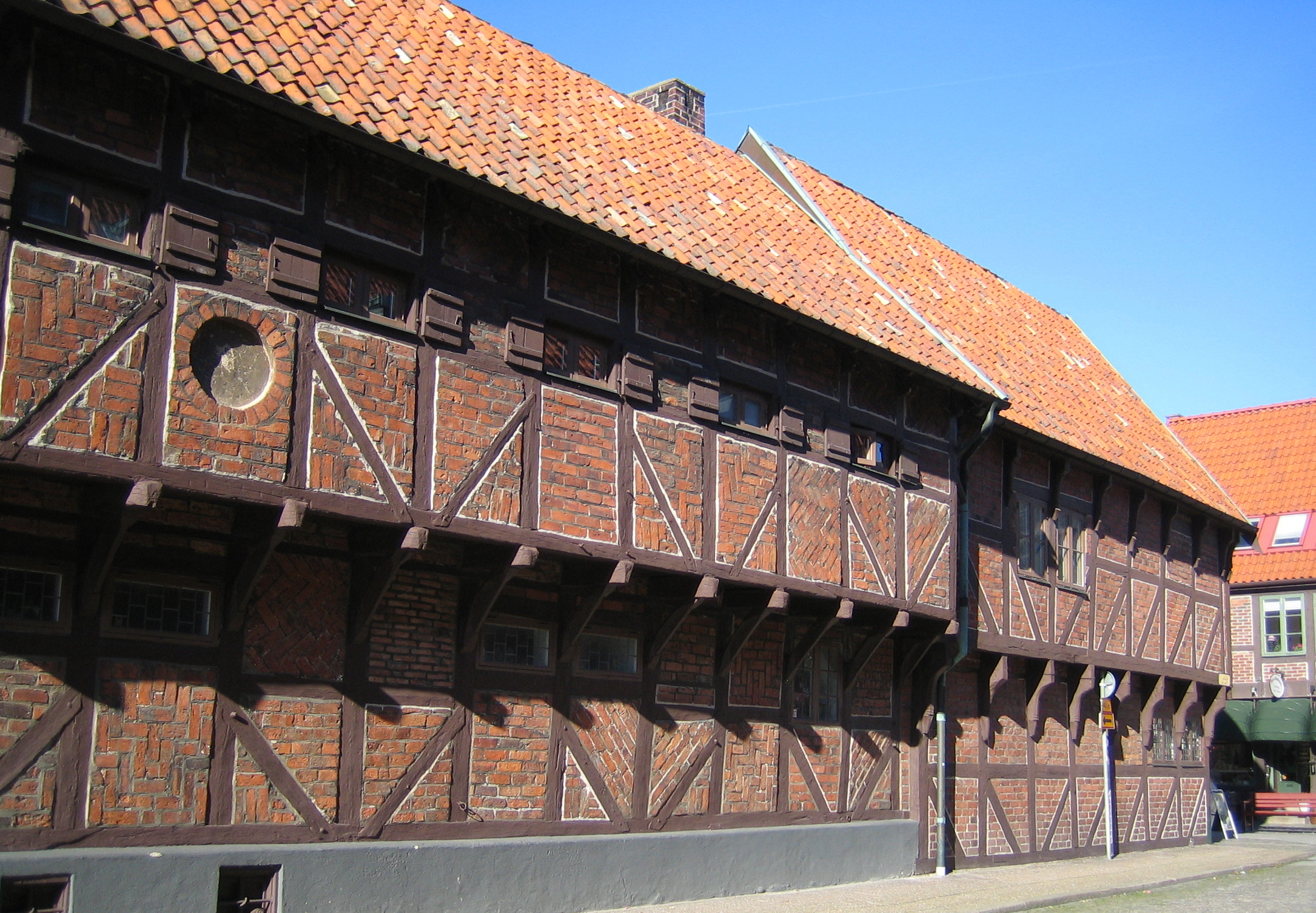 Pilgrändshuset, Ystad, Sweden.